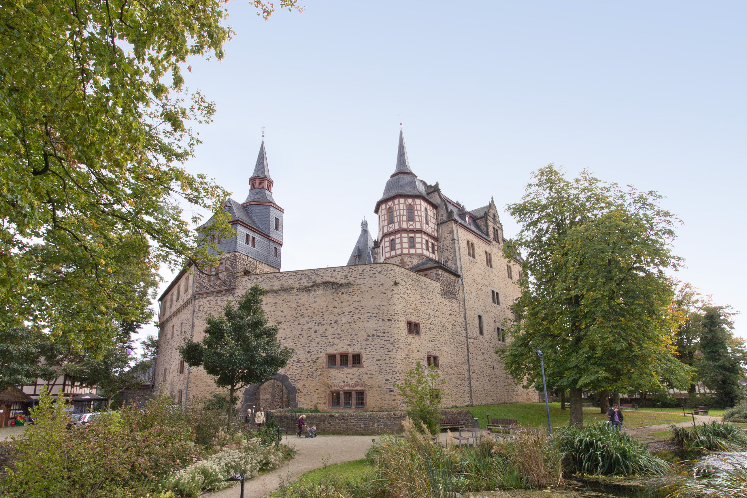 Schloss Romrod in Romrod im Vogelsberg.